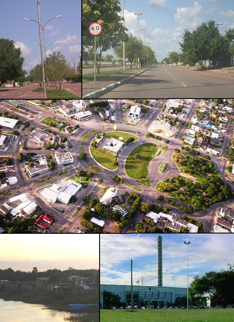 Imagens de Boa Vista